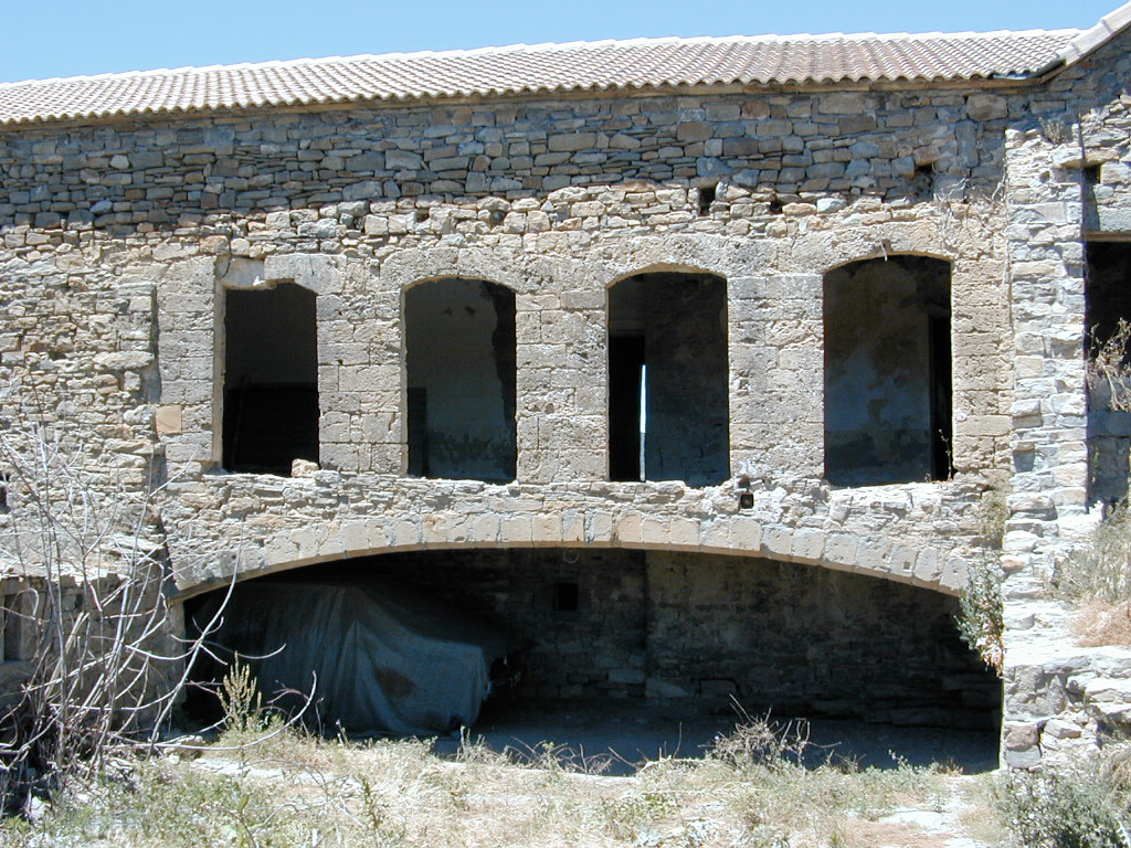 Vista parcial del patio interior del castillo de Morillo de Monclús